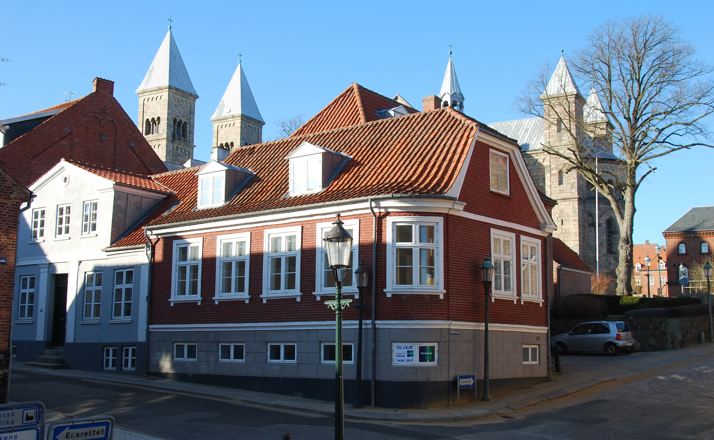 Den fredede bygning "Skolestræde 1" i Viborg.